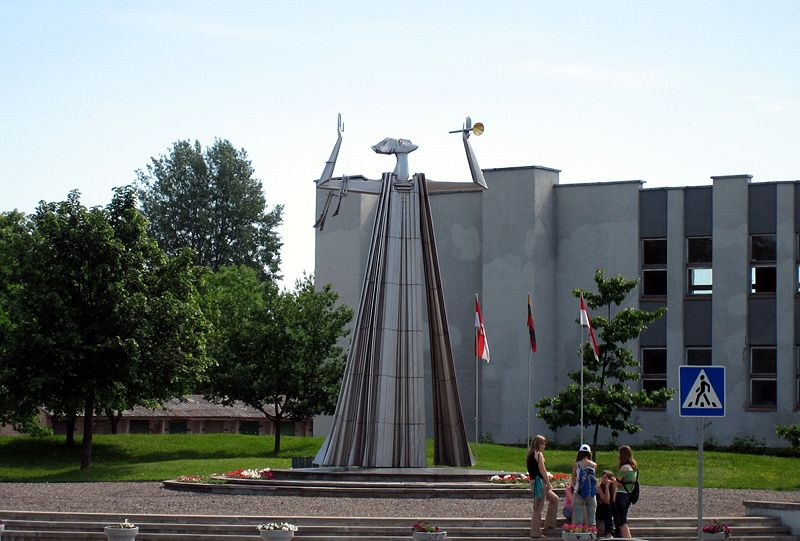 Šilalės Nepriklausomybės aikštė